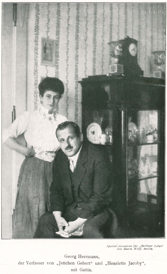 Georg Hermann, eigentlich Georg Hermann Borchardt (1871-1943), deutsch-jüdischer Schriftsteller.